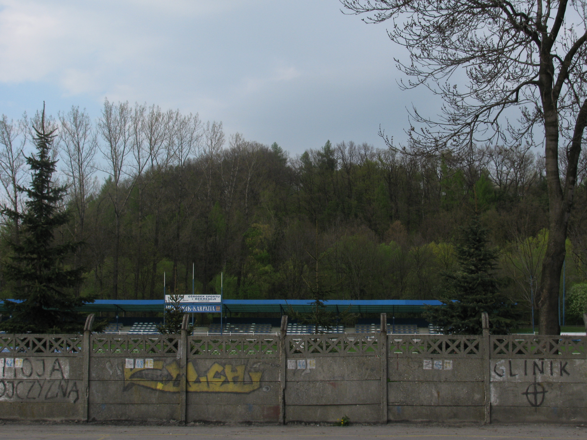 Stadion Glinika Gorlice widziany od strony lodowiska